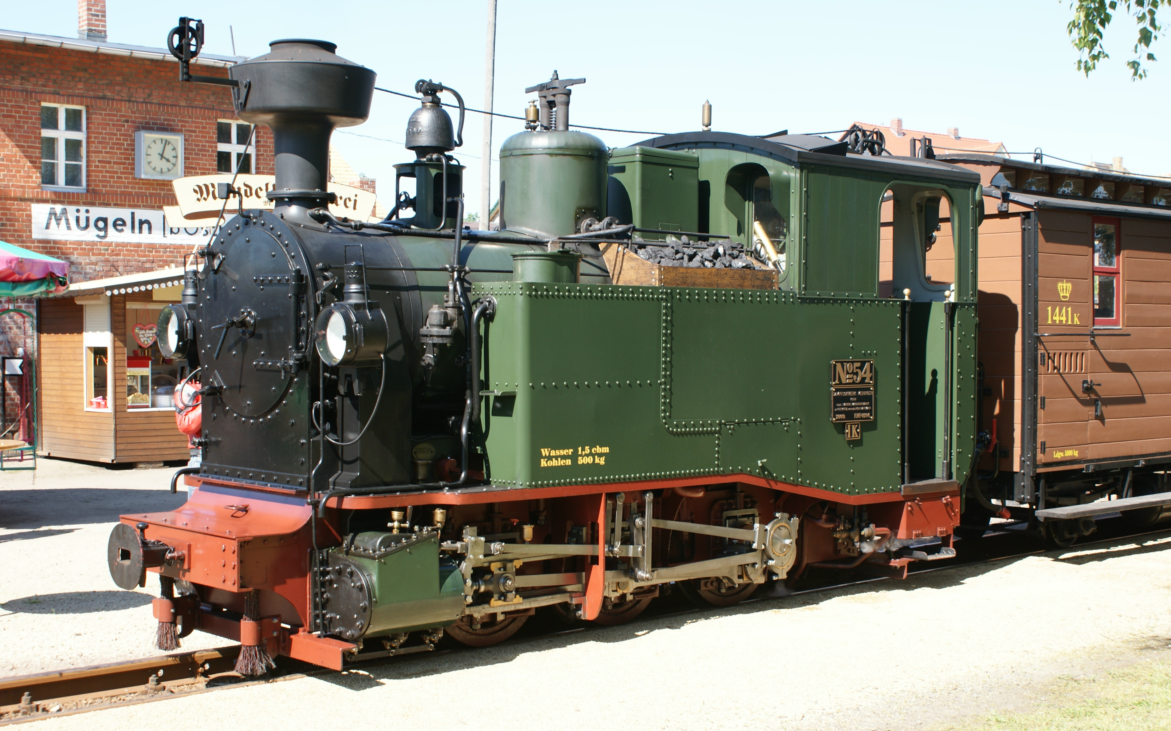 Nachbau-Dampflokomotive der sächsischen Gattung I K Nr.54 in Mügeln 05.Juni 2010